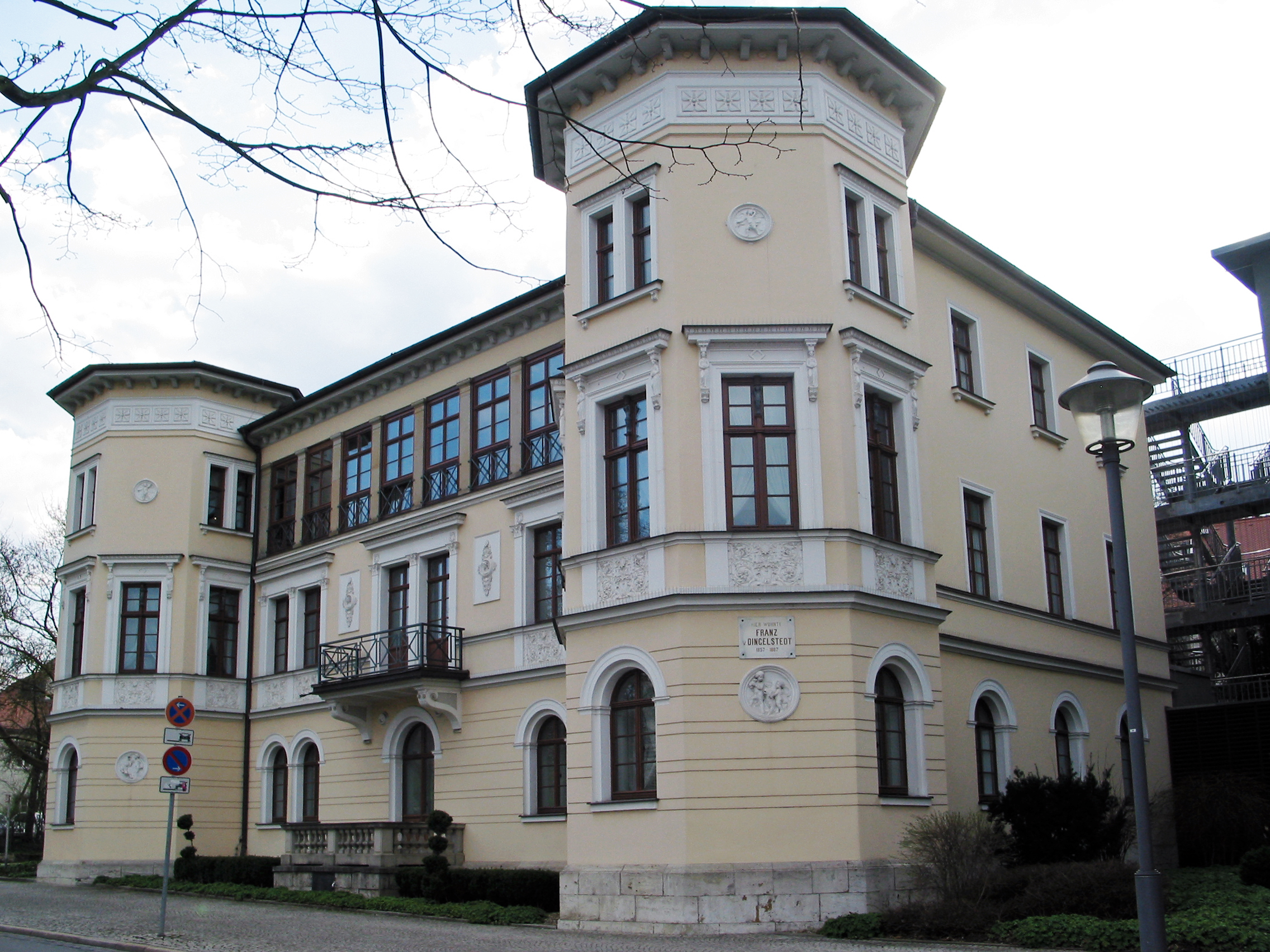 Die Dingelstedt-Villa am Beethovenplatz in Weimar war 1857 bis 1867 Wohnsitz von Franz Dingelstedt, damaliger Generalintendant des Weimarer Hoftheaters. Heute befinden sich in dem Gebäude 4-Sterne-Appartments des benachbarten Dorint-Hotels.